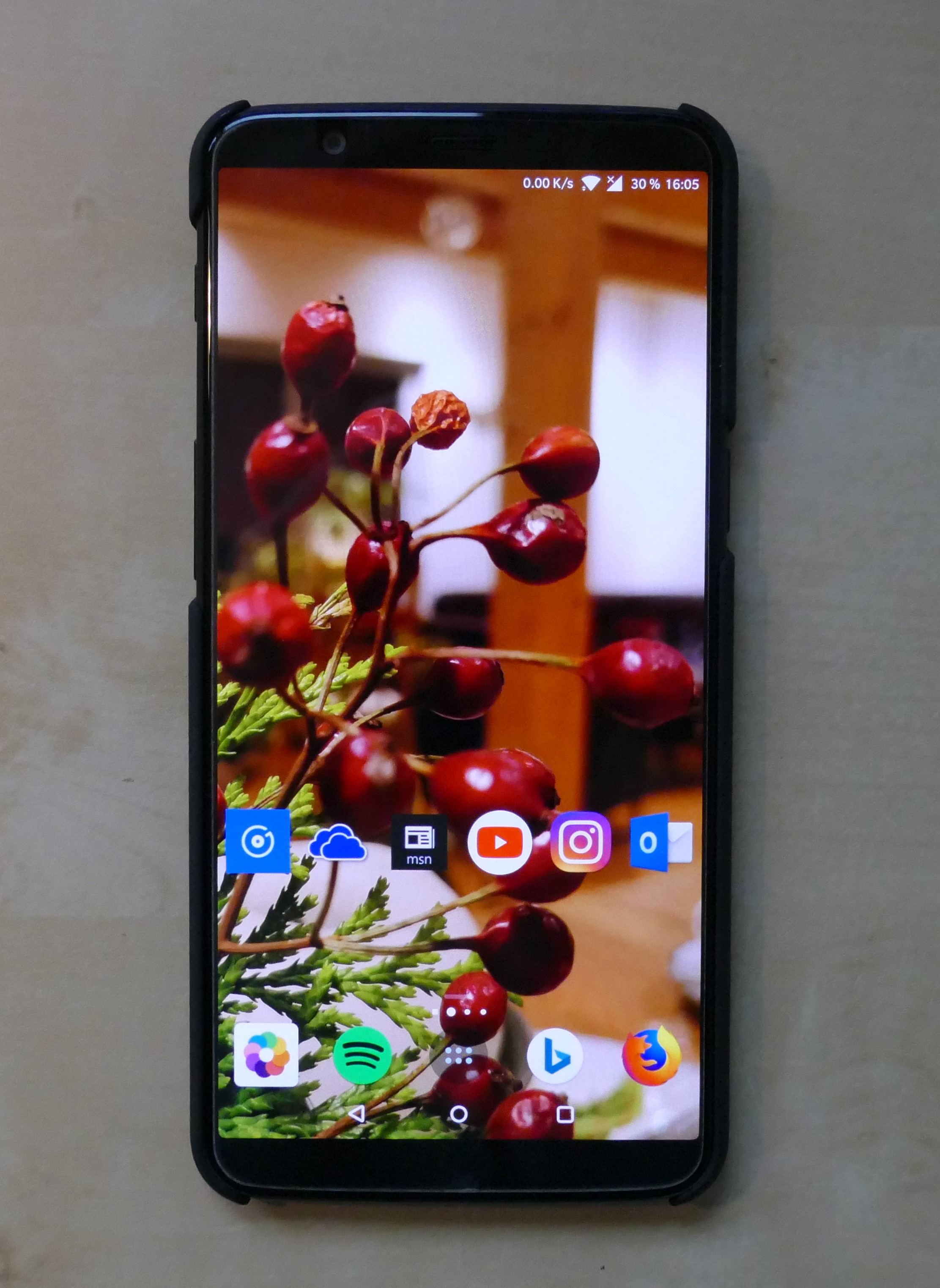 OnePlus 5T Front